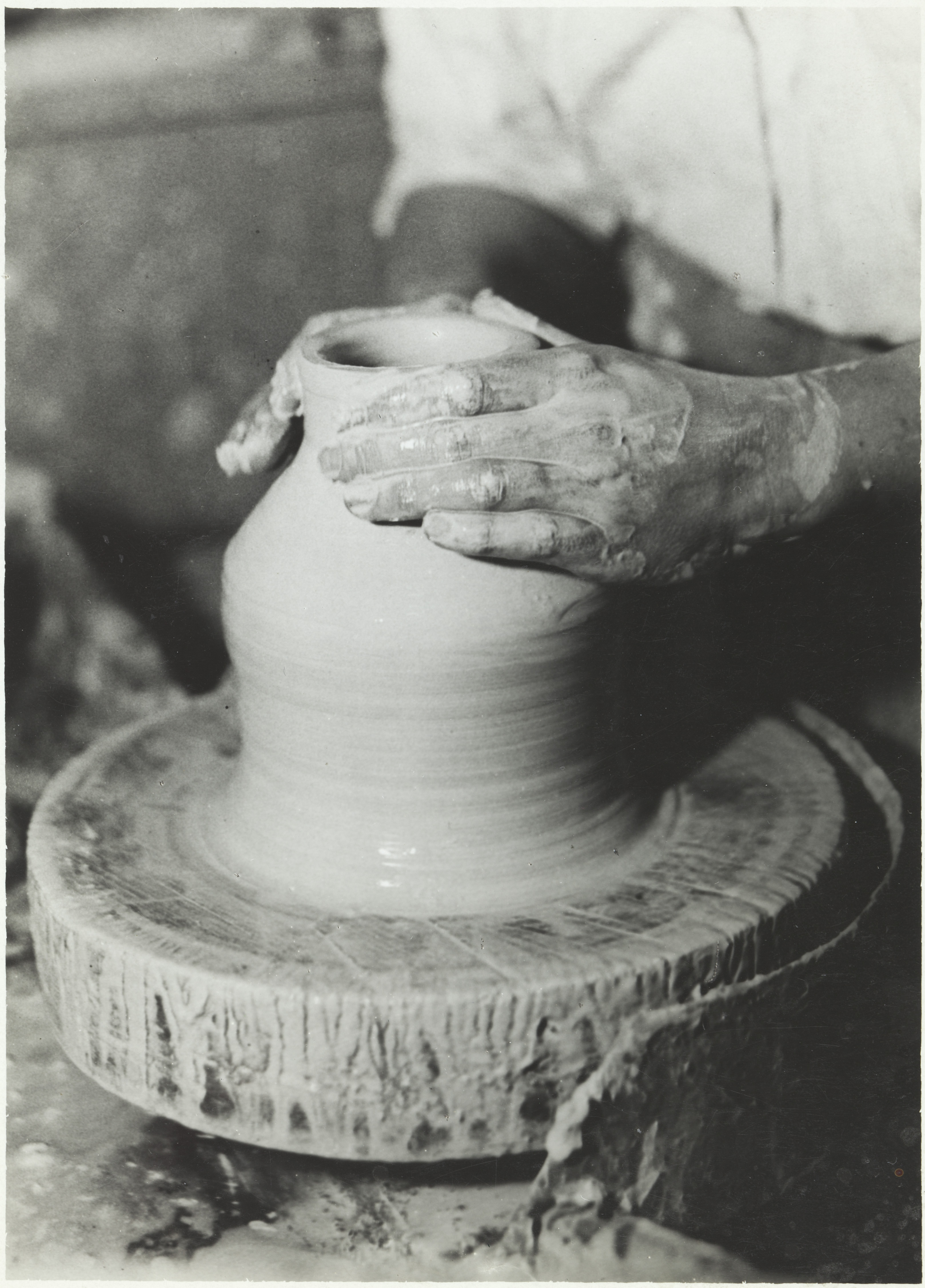 Saven dreijausta, keramiikkataiteen osasto, 1930-luku. . Taideteollisuuskeskuskoulun opetustilanteita. Aalto-yliopisto / Aalto University Tiedätkö lisää tästä kuvasta? Jätä kommentti tai ota yhteyttä sähköpostitse: Lisätietoja kuvakokoelmista / more information